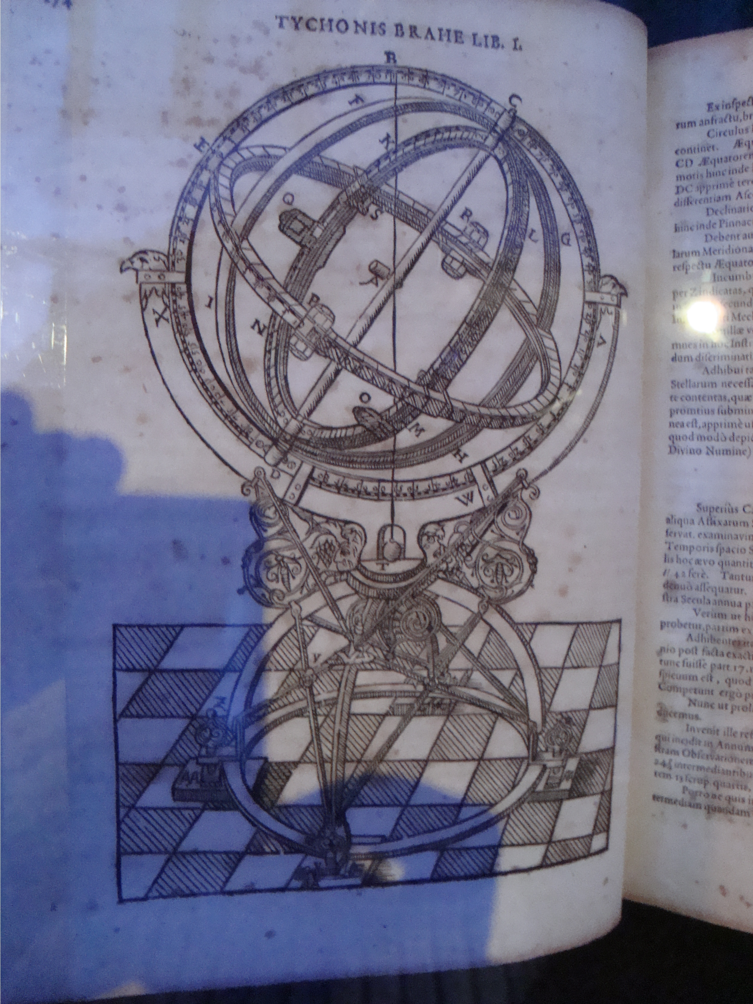 Page de Opera Omnia, livre de Tycho Brahe paru en 1648. Détenu par le service historique de la marine de Brest. Cliché pris en 2008 au chateau de Kerjean en Bretagne.